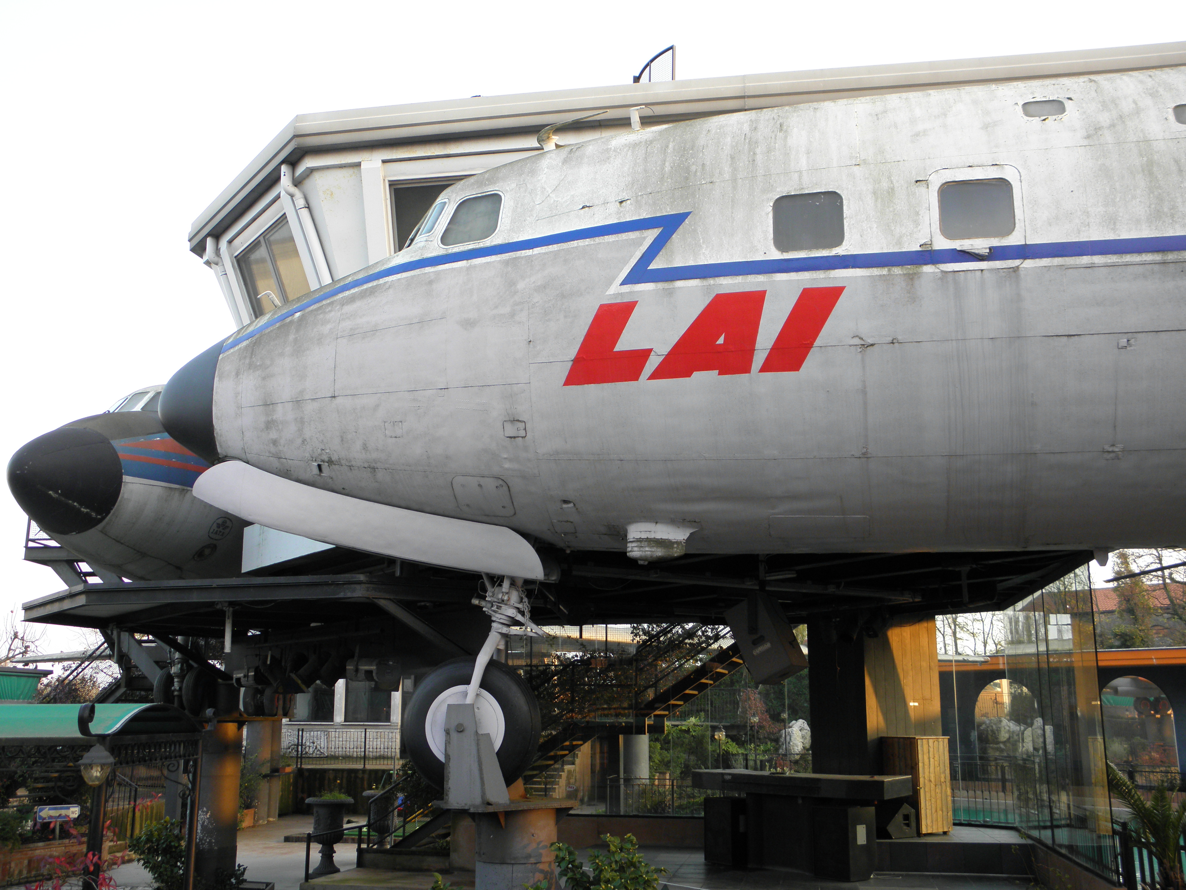 Douglas DC-6 marche I-DIMA (MM 61965 (31-5)) nella livrea della compagnia aerea LAI Linee Aeree Italiane: collezione "Michelangelo Da Vinci", comune di Villamarzana, provincia di Rovigo. Naso e carrello anteriore.